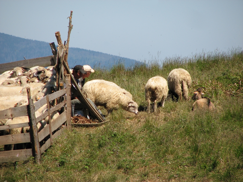 owce pod Pilskiem